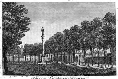 Incisione con veduta di Piazza Ariostea dopo l'innalzamento della statua di Ludovico Ariosto avvenuta nel 1833.